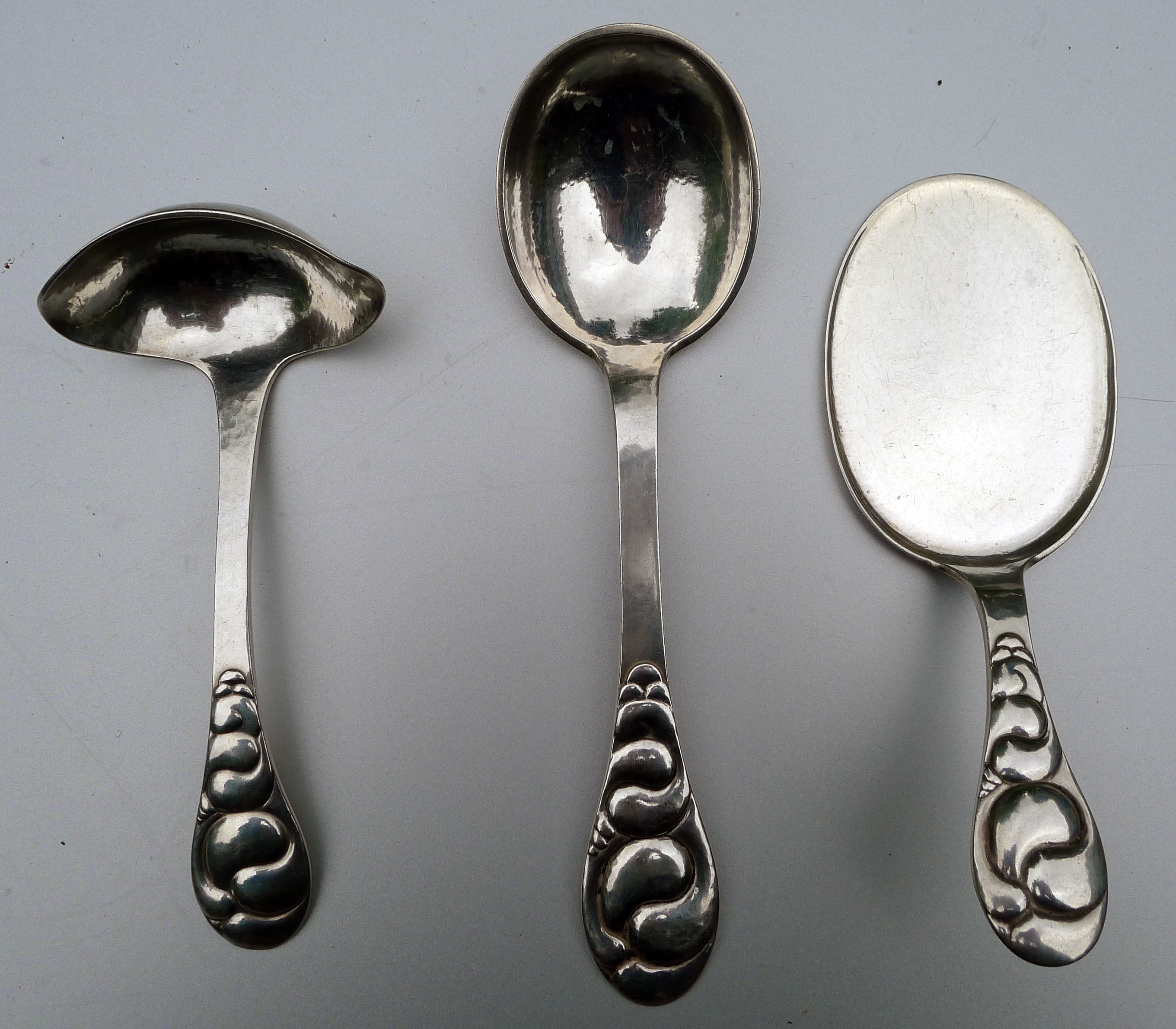 Sølvsmed Evald Nielsen (1879-1958) No. 4